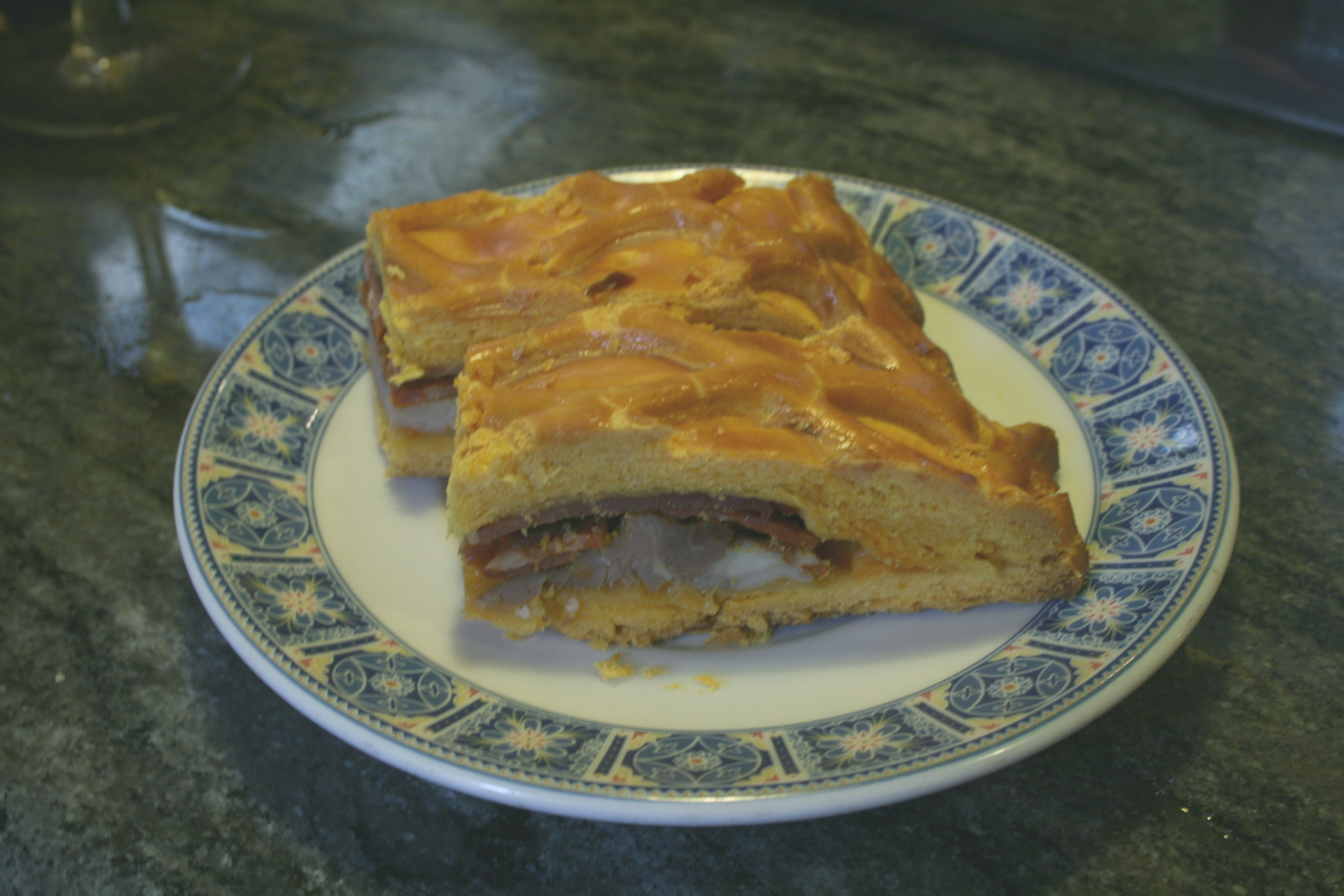 Tapa de Hornazo